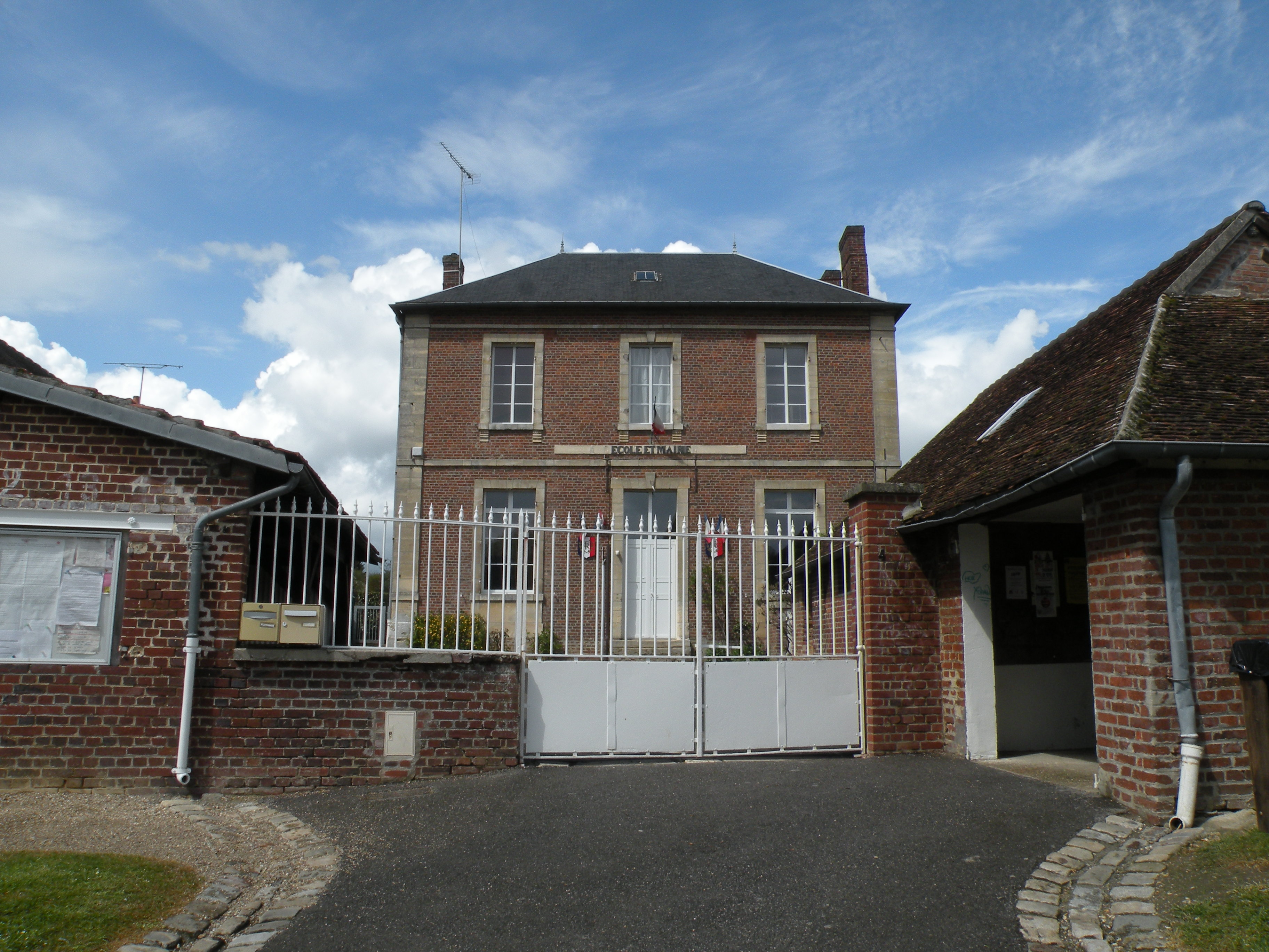 mairie école de Senots